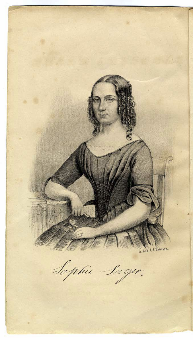 Bildtext: "Tr. hos A.J. Salmson."